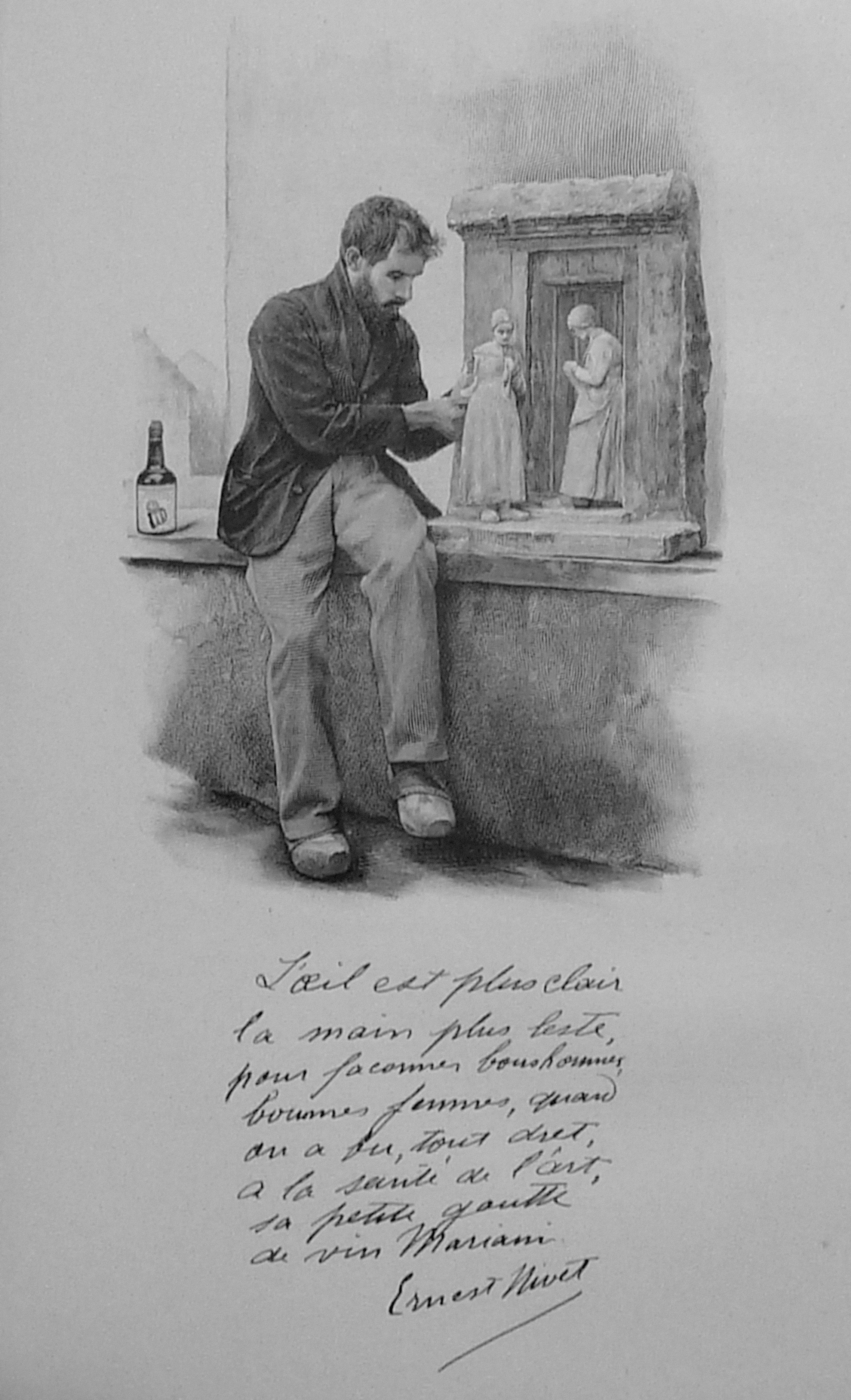 Ernest Nivet, gravure d'après photo dans Figures contemporaines Album Mariani tome XI, 1908. Graveur Henri Othon Brauer